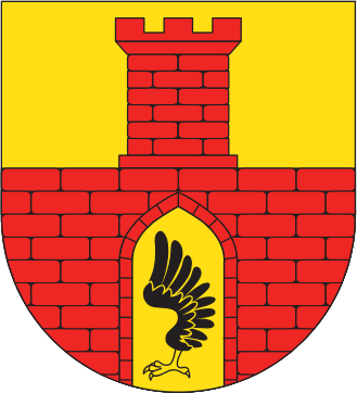 Herb gminy Budziszewice